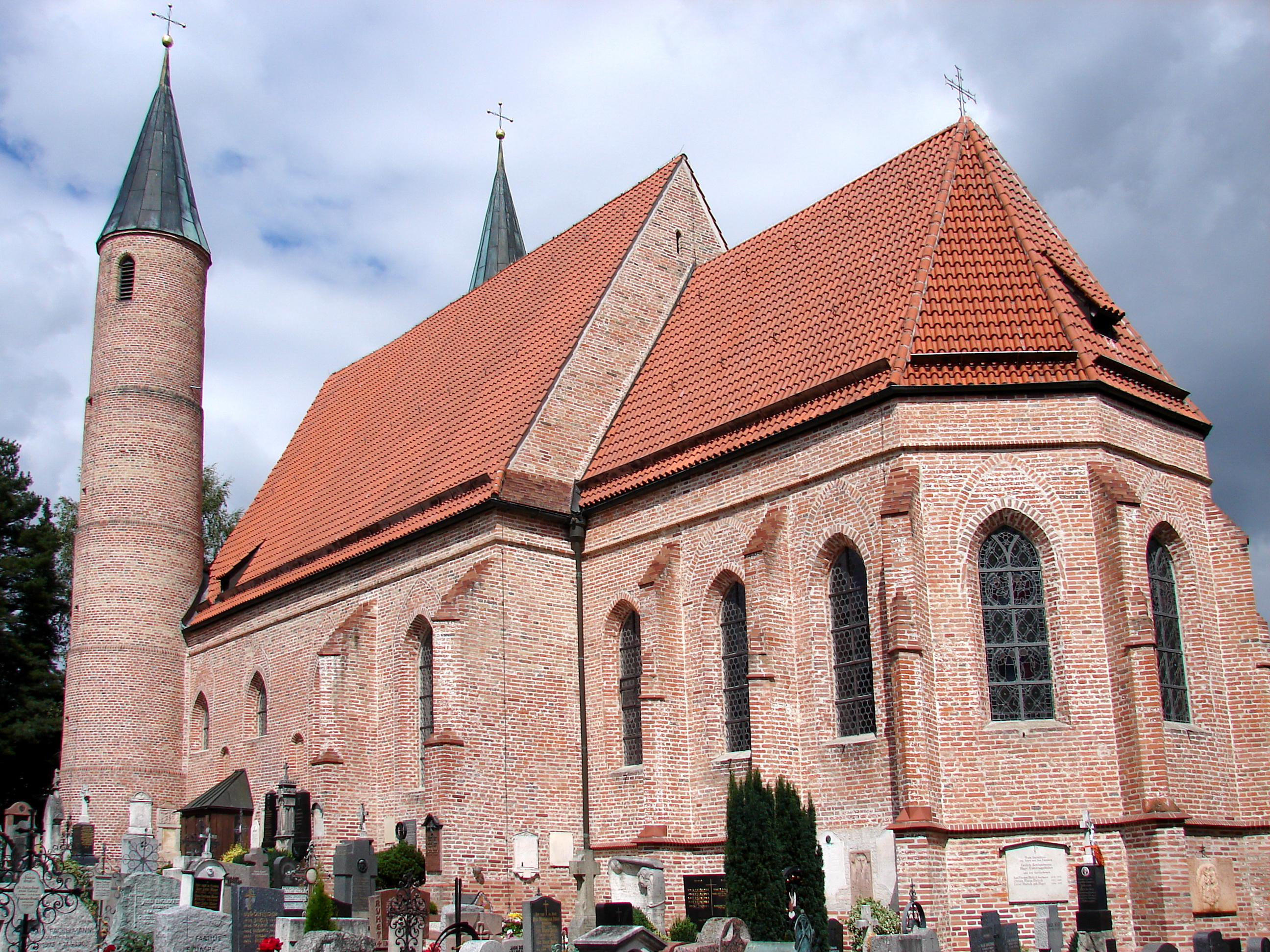 einschiffige, gewölbte Anlage, spätgotisch, Mitte 15. Jh., an der Westseite Vorhalle und zwei runde Flankentürme; mit Ausstattung; Friedhofsummauerung, wohl im Kern noch spätmittelalterlich; Leichenhalle, 2. Hälfte 19. Jh.; Grabmal des Pfarrers Anton Mayr, neugotisch von Wilhelm Schweinberger 1870; vor der Kirche Wasserbecken mit schmiedeeisernem Gitter, 19. Jh.